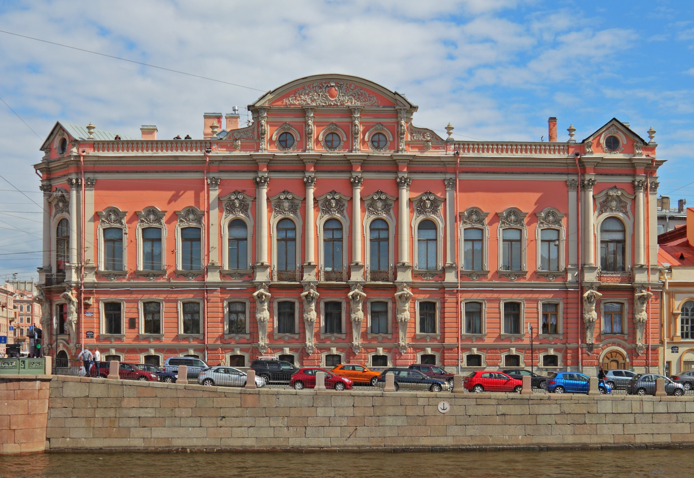 Санкт-Петербург, Россия. Дворец Белосельских-Белозерских (Фонтанка / Невский пр-т).